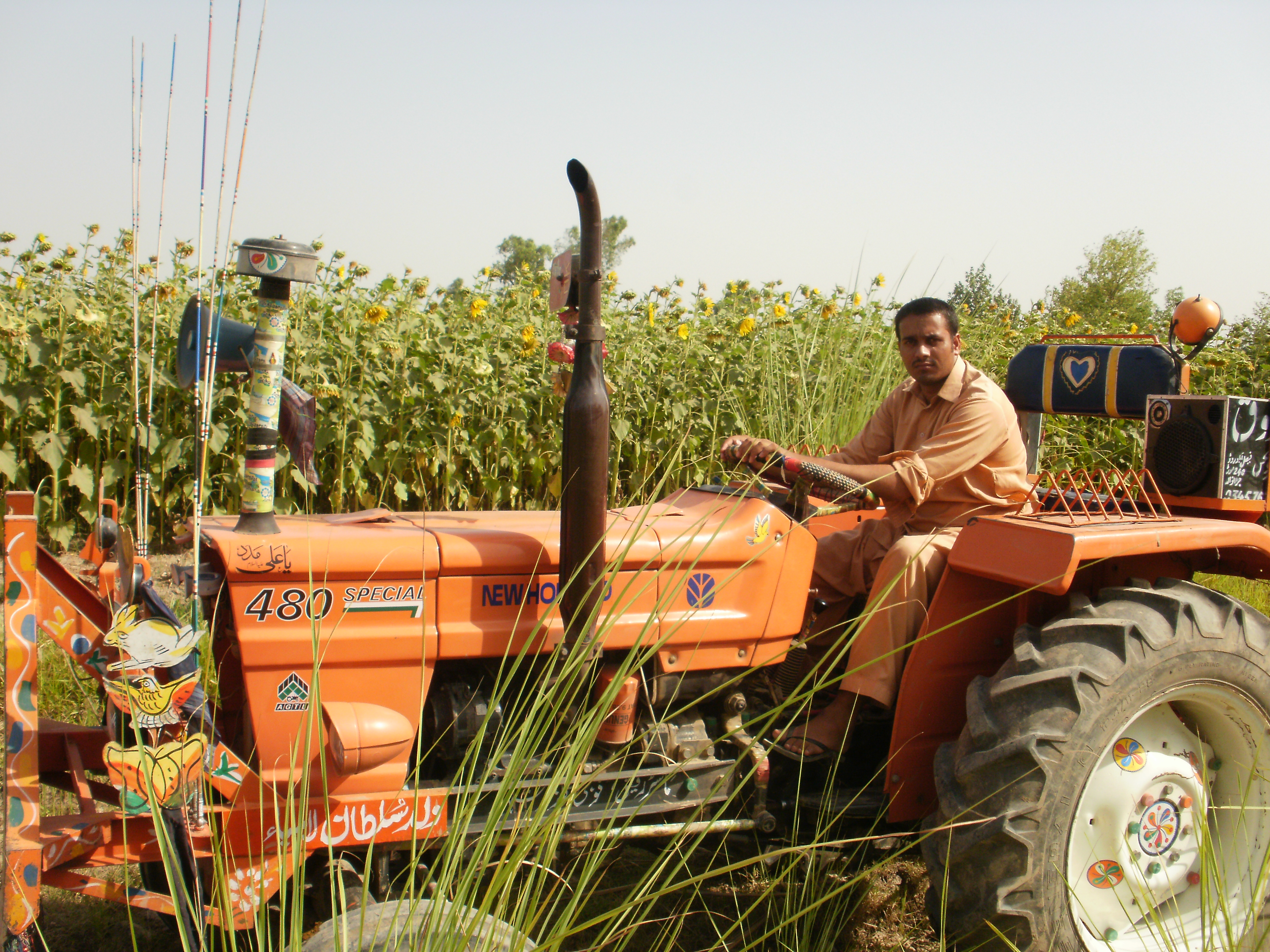 Samundri Tehsil, Pakistan